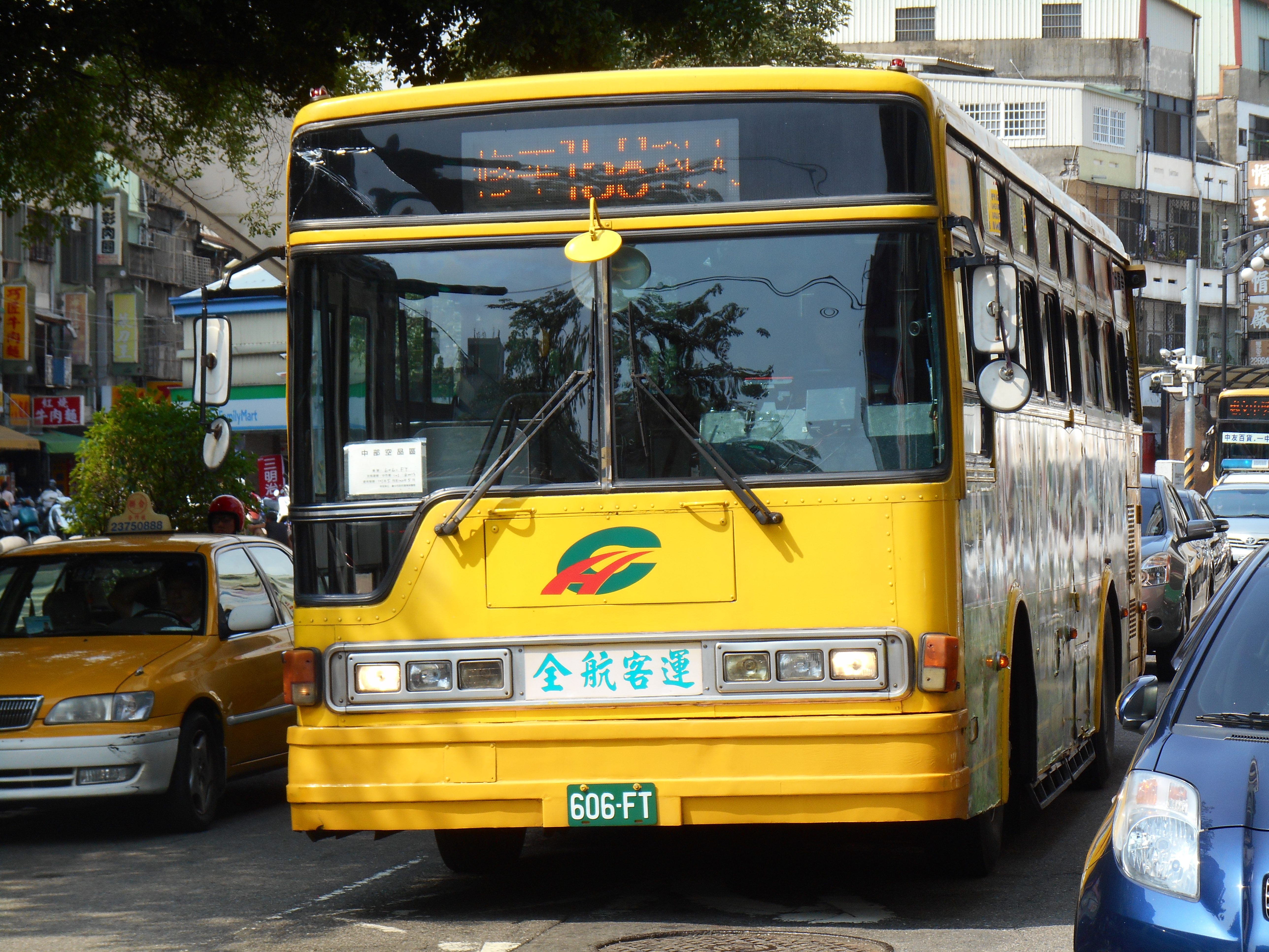 2001 ISUZU LT134L